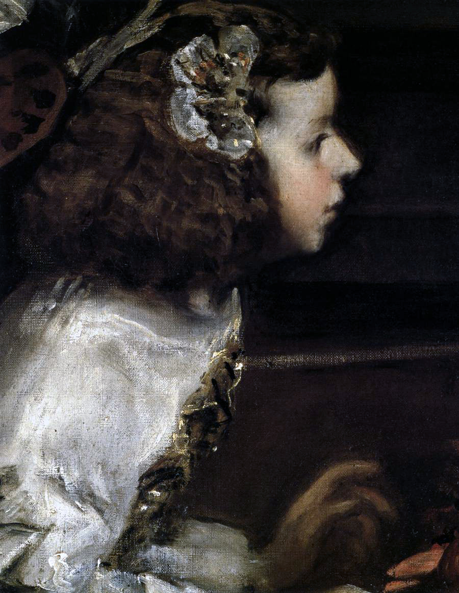 detail